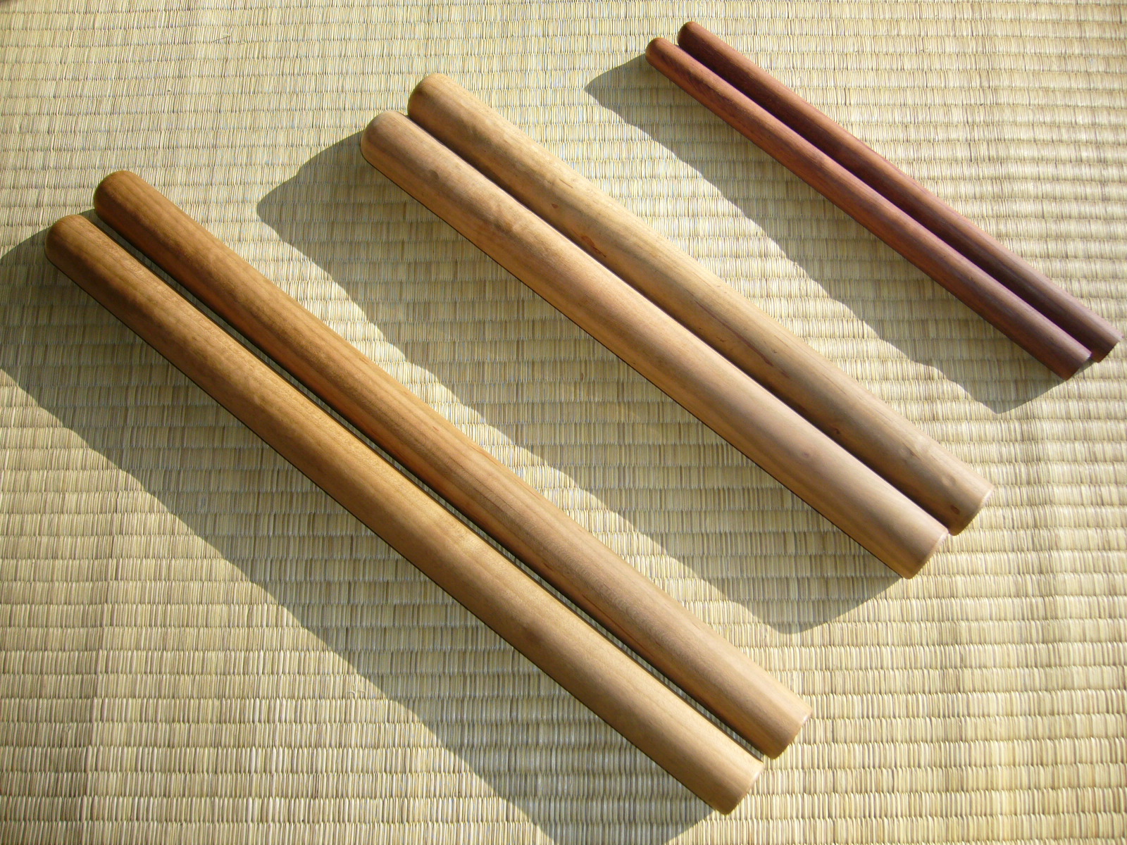 drumstick,japanese drum,bachi,Oo-daiko&tsuke-daiko,katori-city,japan